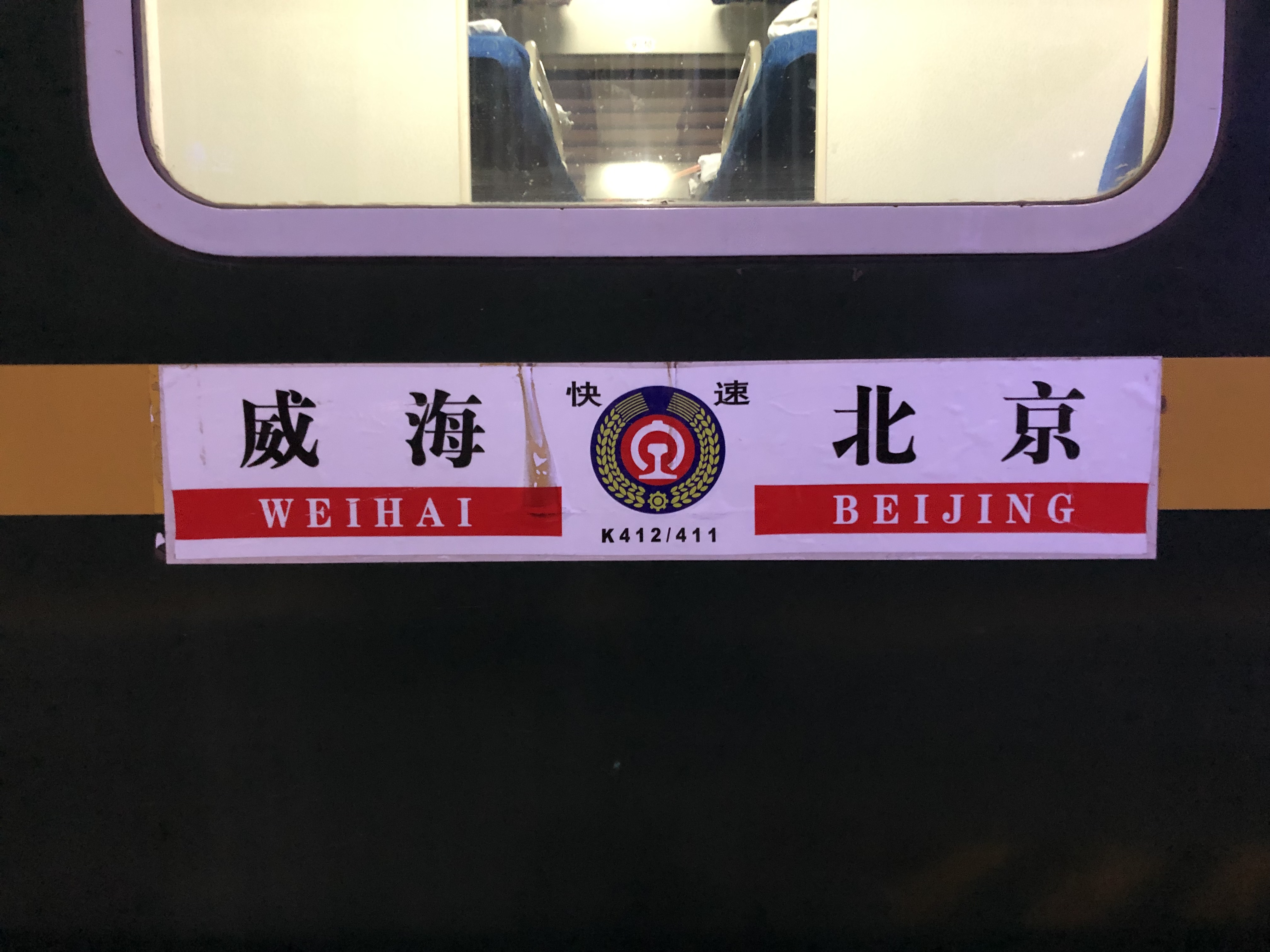 中文（中国大陆）: K411/412次列车的水牌，摄于北京站